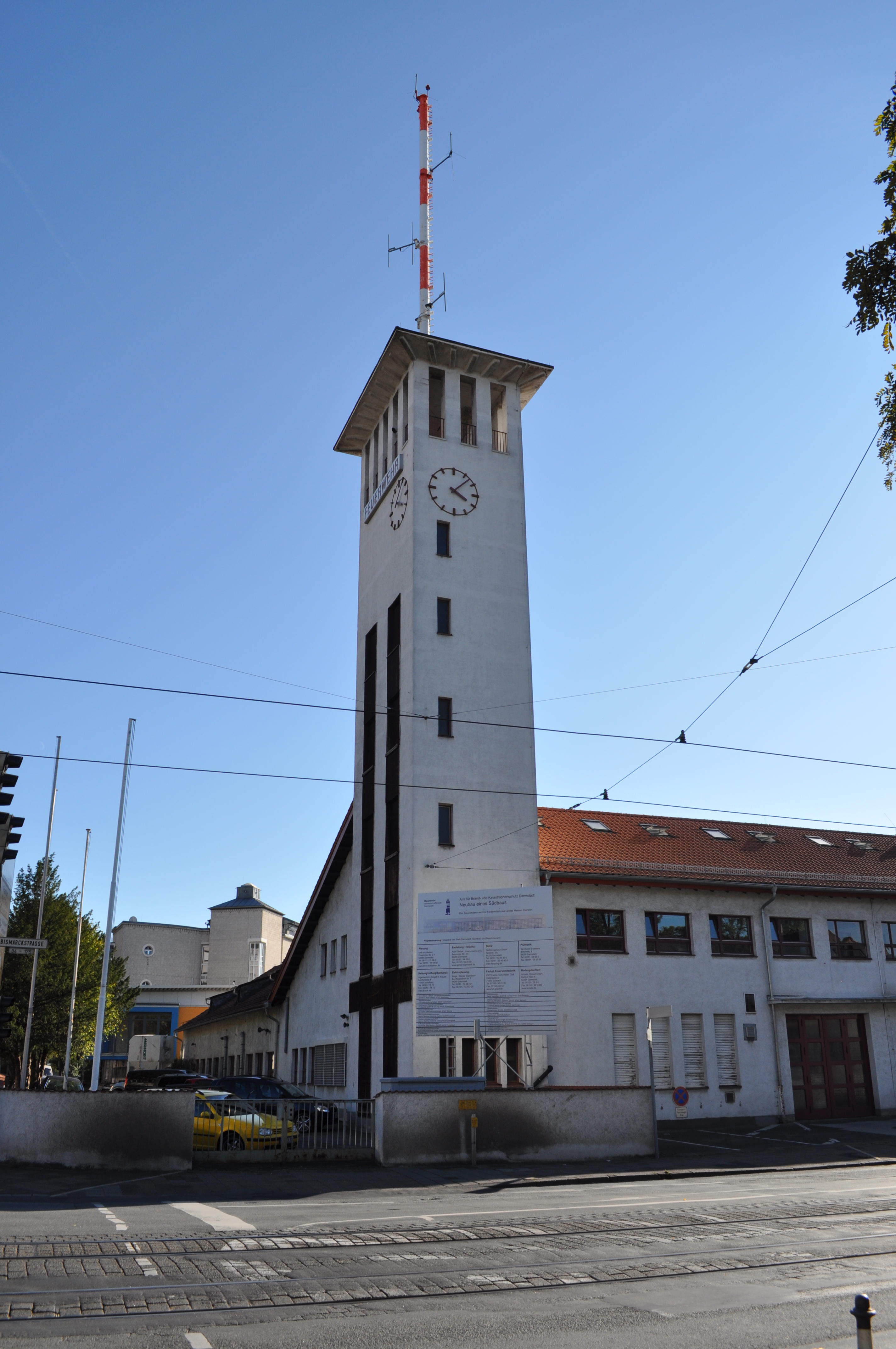 Darmstadt, Feuerwehr, Turm